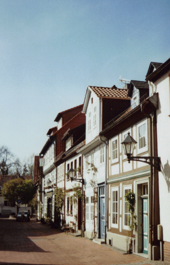 Fachwerkhäuser in der Knollenstraße in der Hildesheimer Neustadt